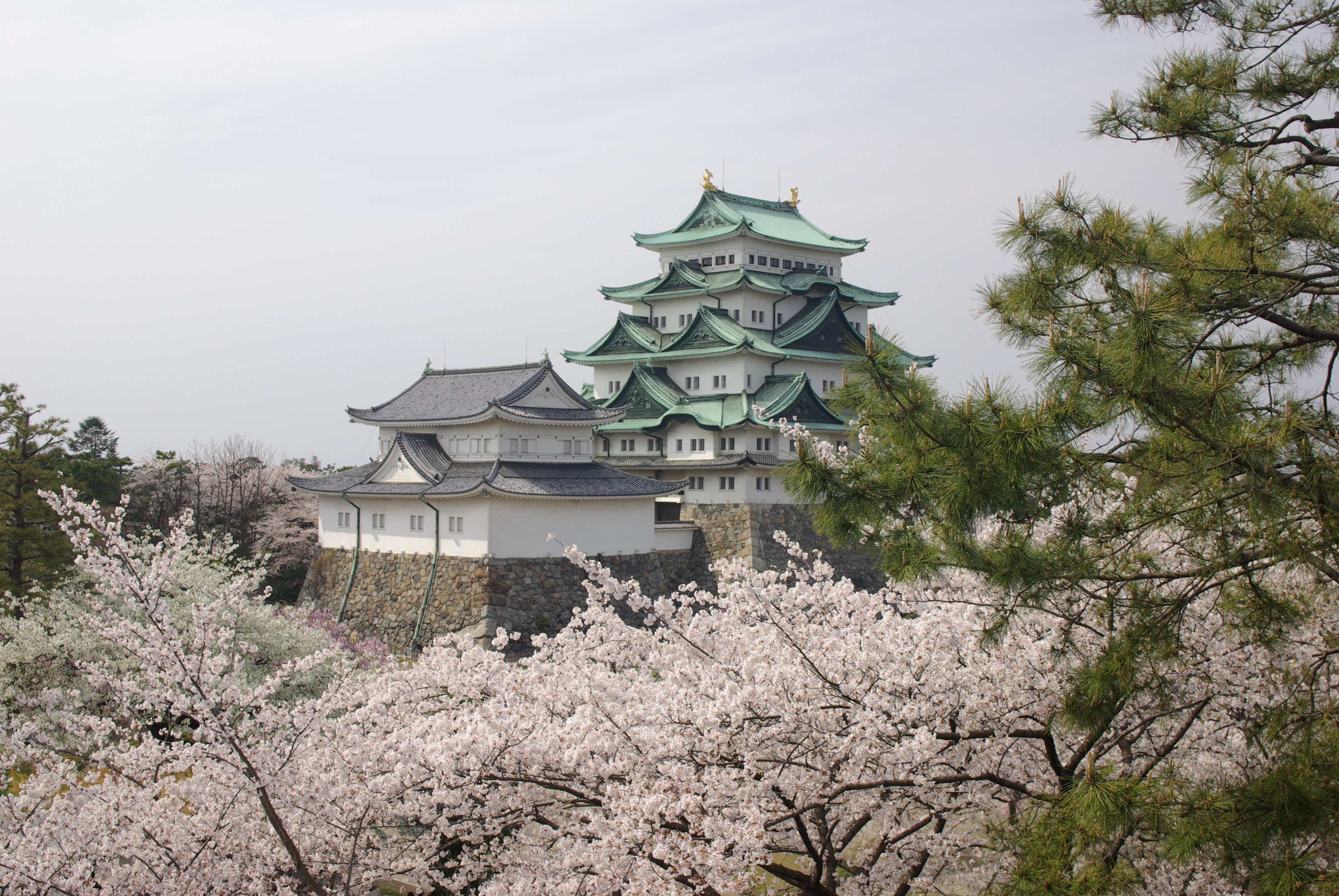 南東隅櫓からみた名古屋城天守